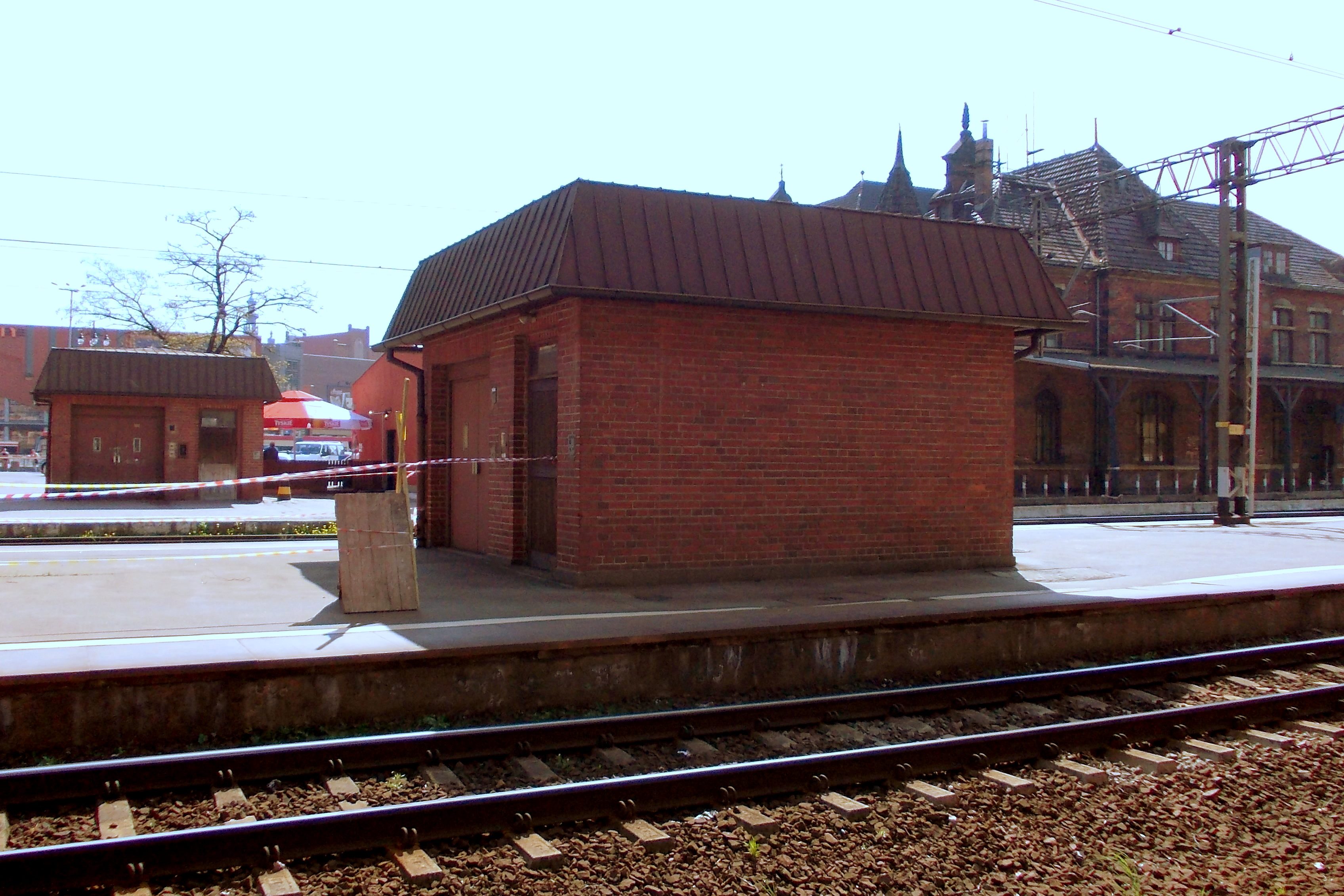 zadaszenie tunelu bagażowego w Gdańsku Głównym